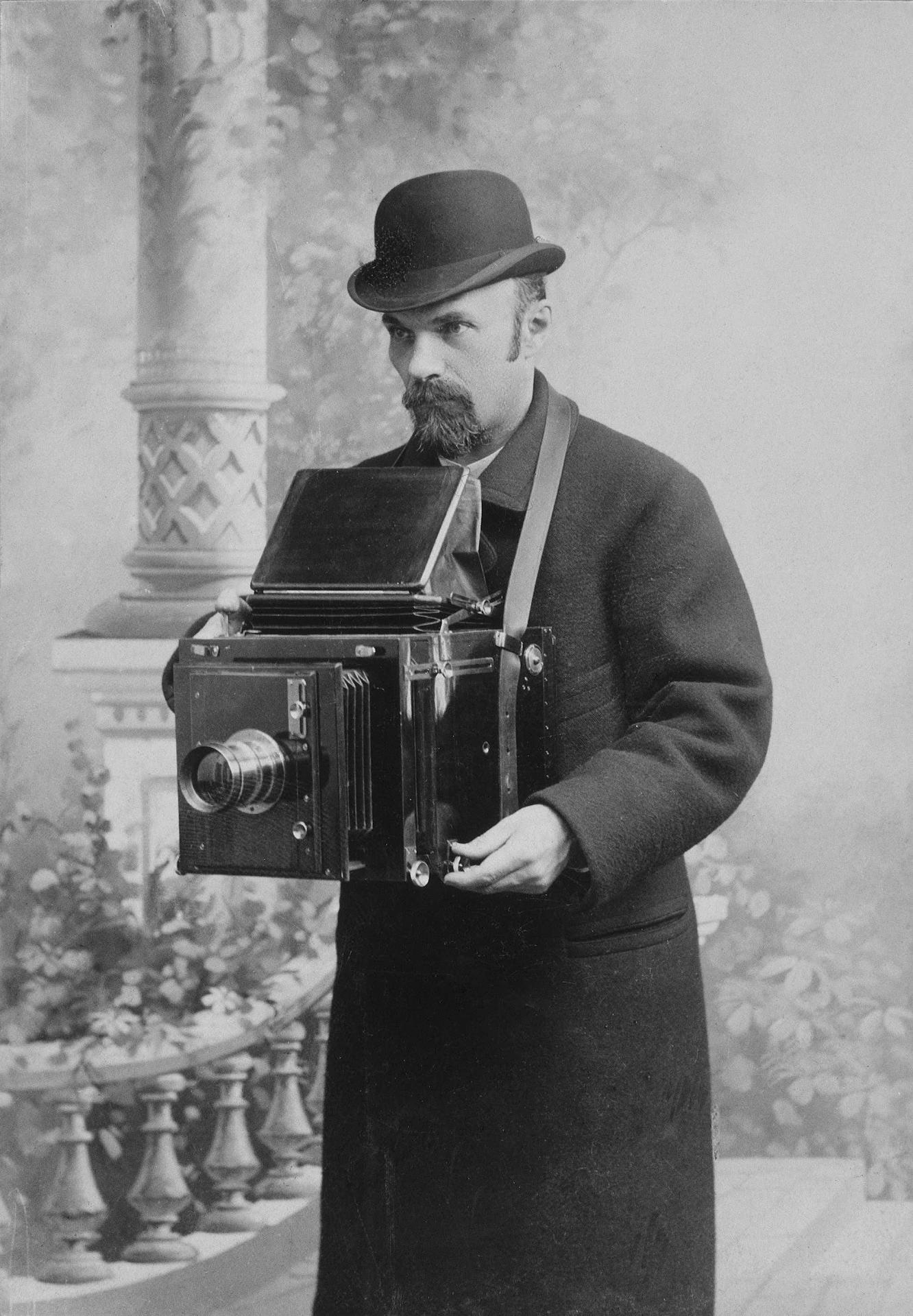 Карл Булла. Автопортрет